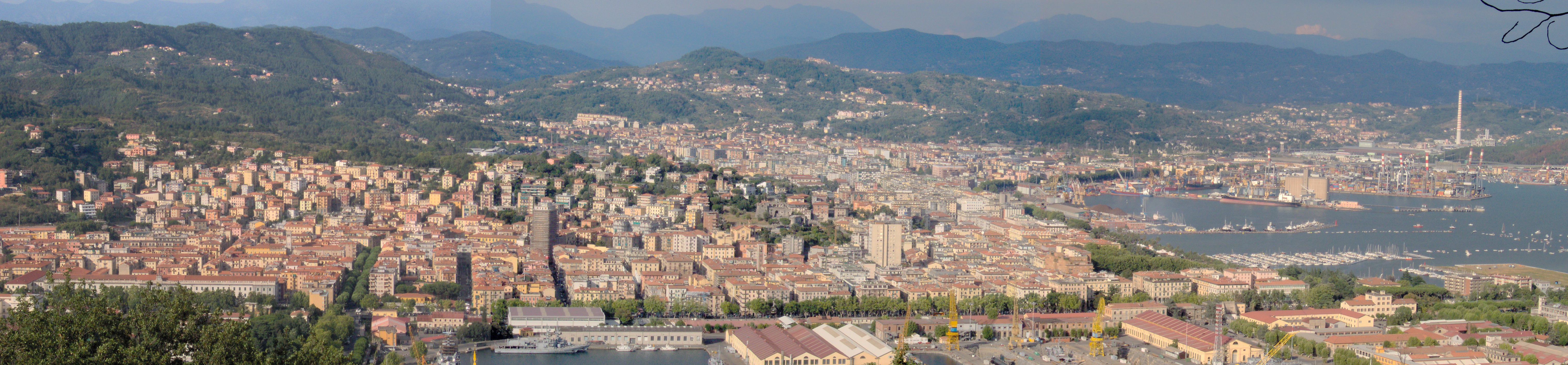 La Spezia vista dalla strada che collega le Cinque Terre (Litoranea)